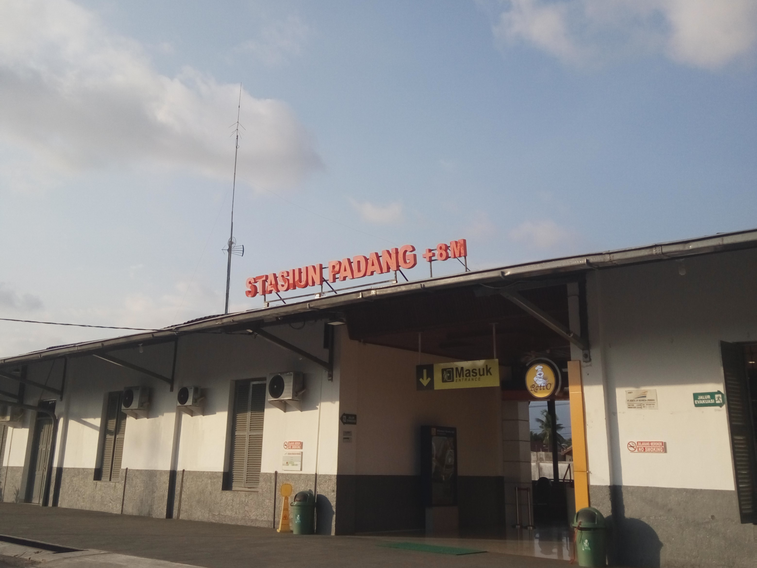 Tampak depan dari bangunan utama Stasiun Padang, 2019